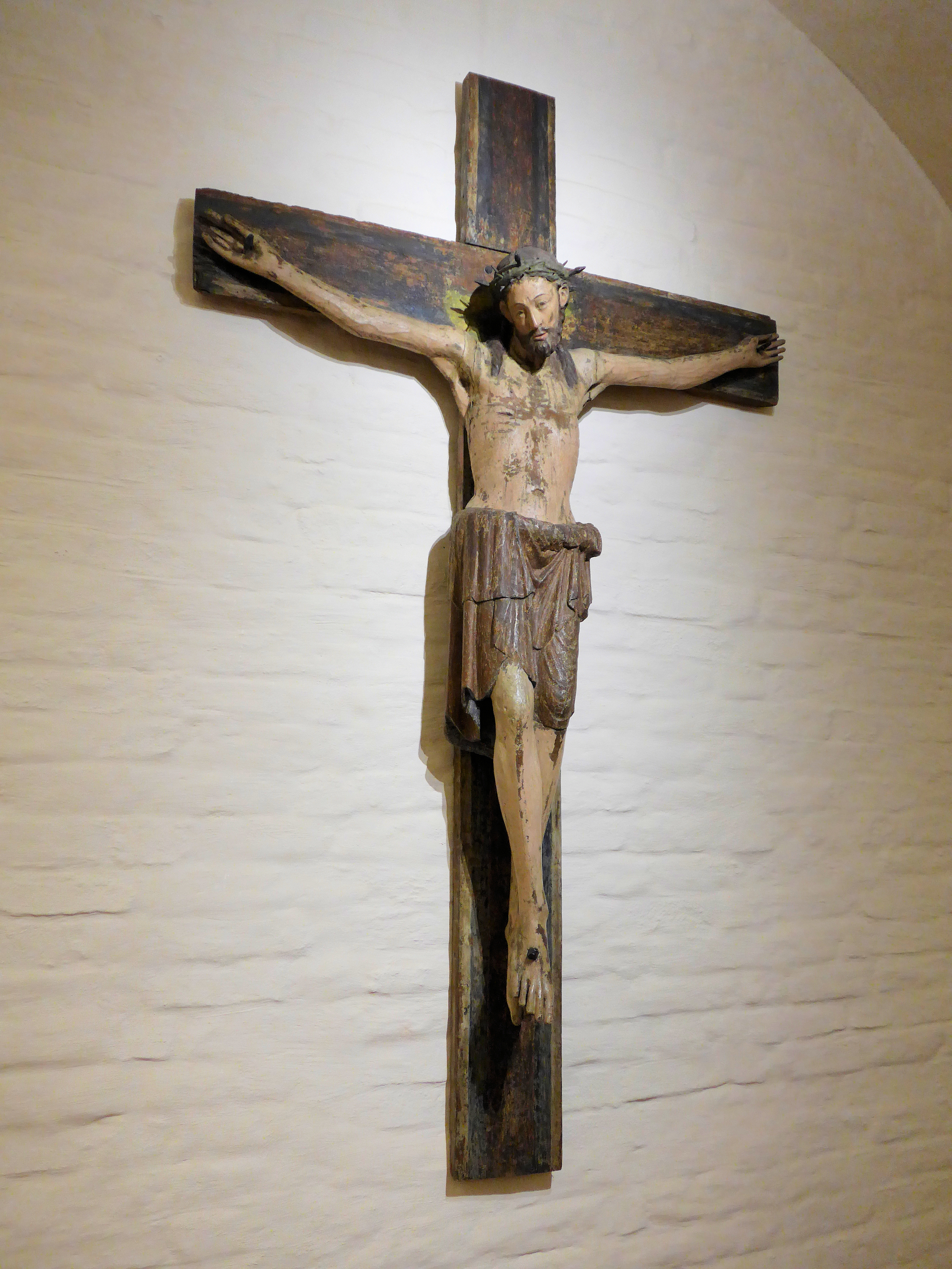 Triumphkreuz aus der Kirche des Johannisklosters Rostock, 13. Jahrhundert